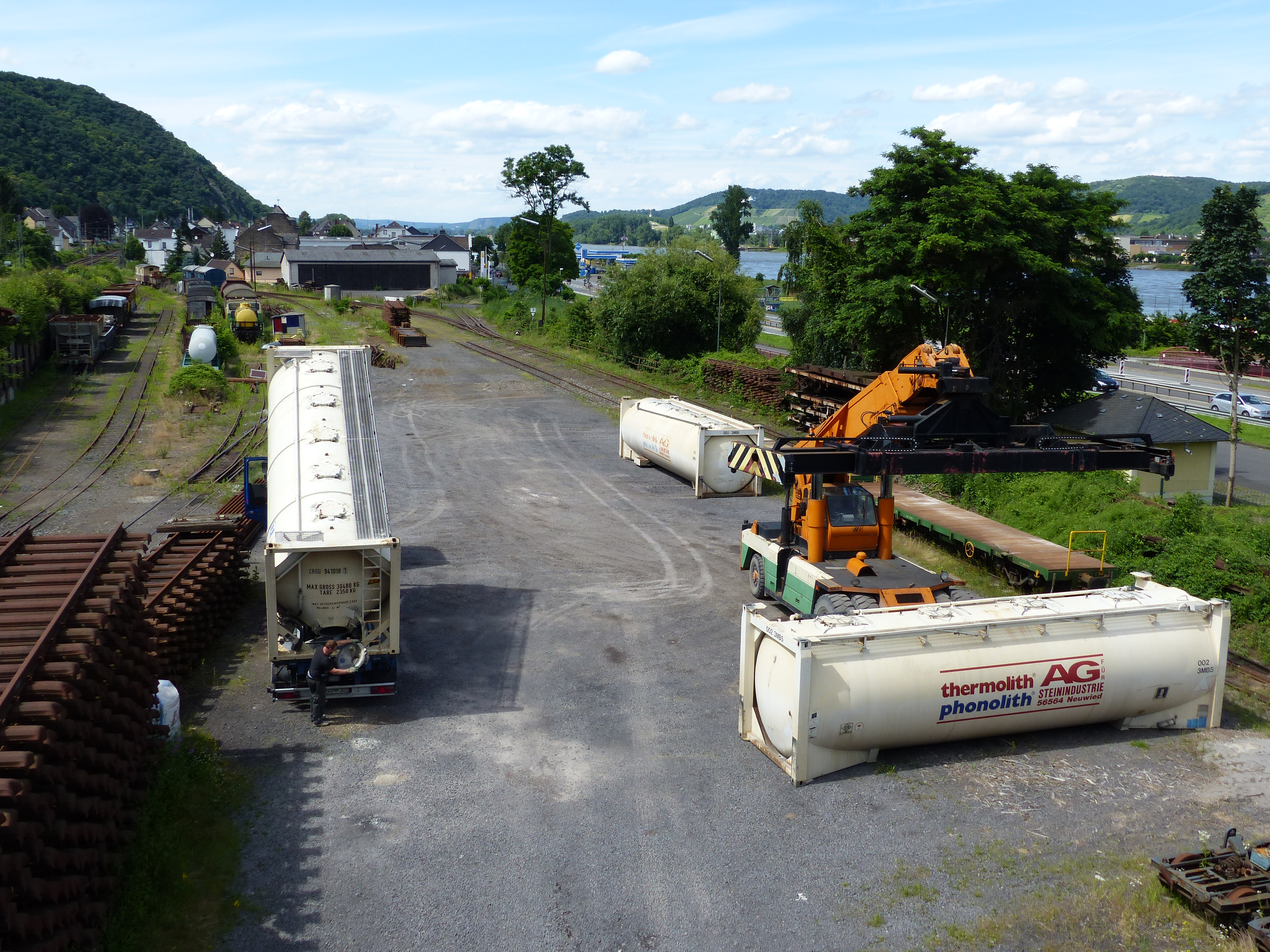 Umladung der Phonolith-Container der AG für Steinindustrie im Bahnhof Brohl. Hinter dem Umladeplatz ist der ehemalige Lokschuppen und rechts davon das Dreischienengleis zum Hafen zu erkennen.